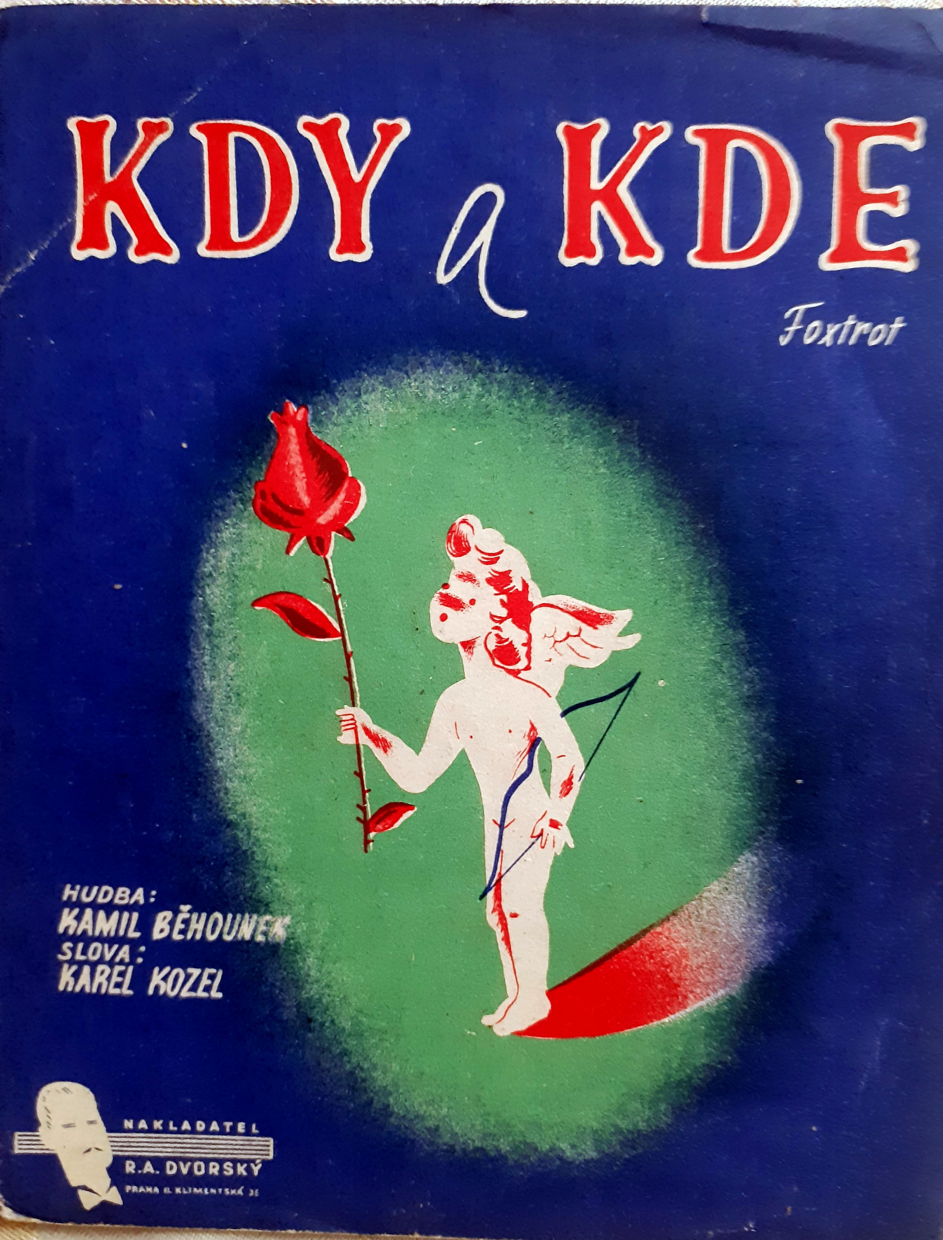 Notová úprava a text písně. Vydalo Nakladatelství R.A.Dvorský